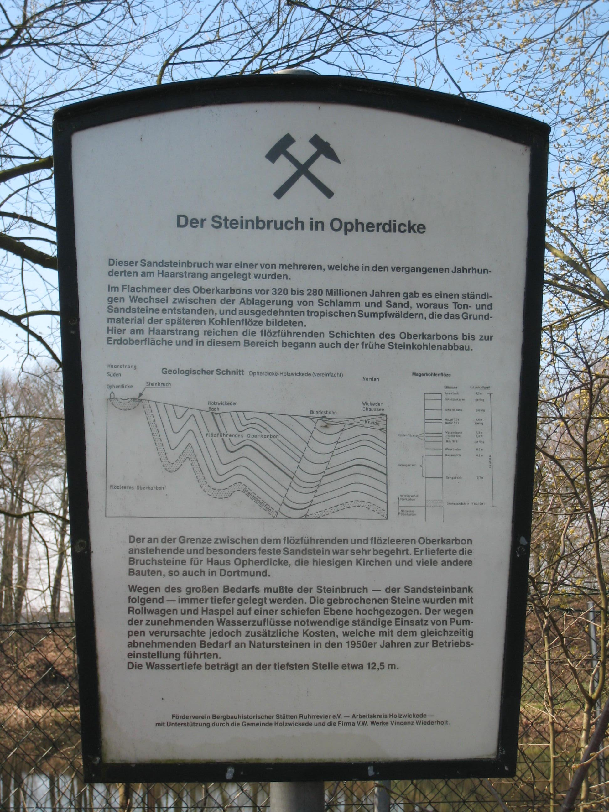 Informationstafel zum Sandsteinbruch Opherdicke, Historischer Bergbaurundweg Holzwickede (Station 13)